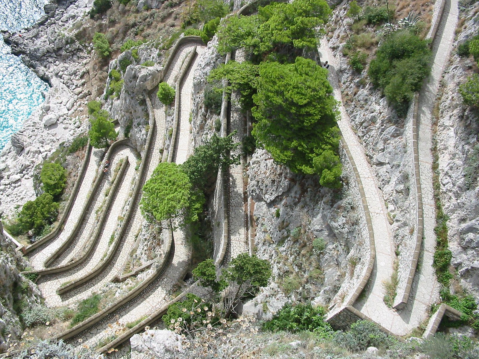 Ansicht von oben auf die Via Krupp auf Capri